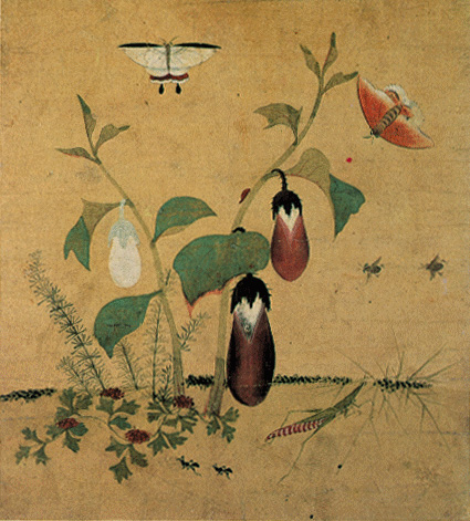 신사임당의 초충도 (草蟲圖)